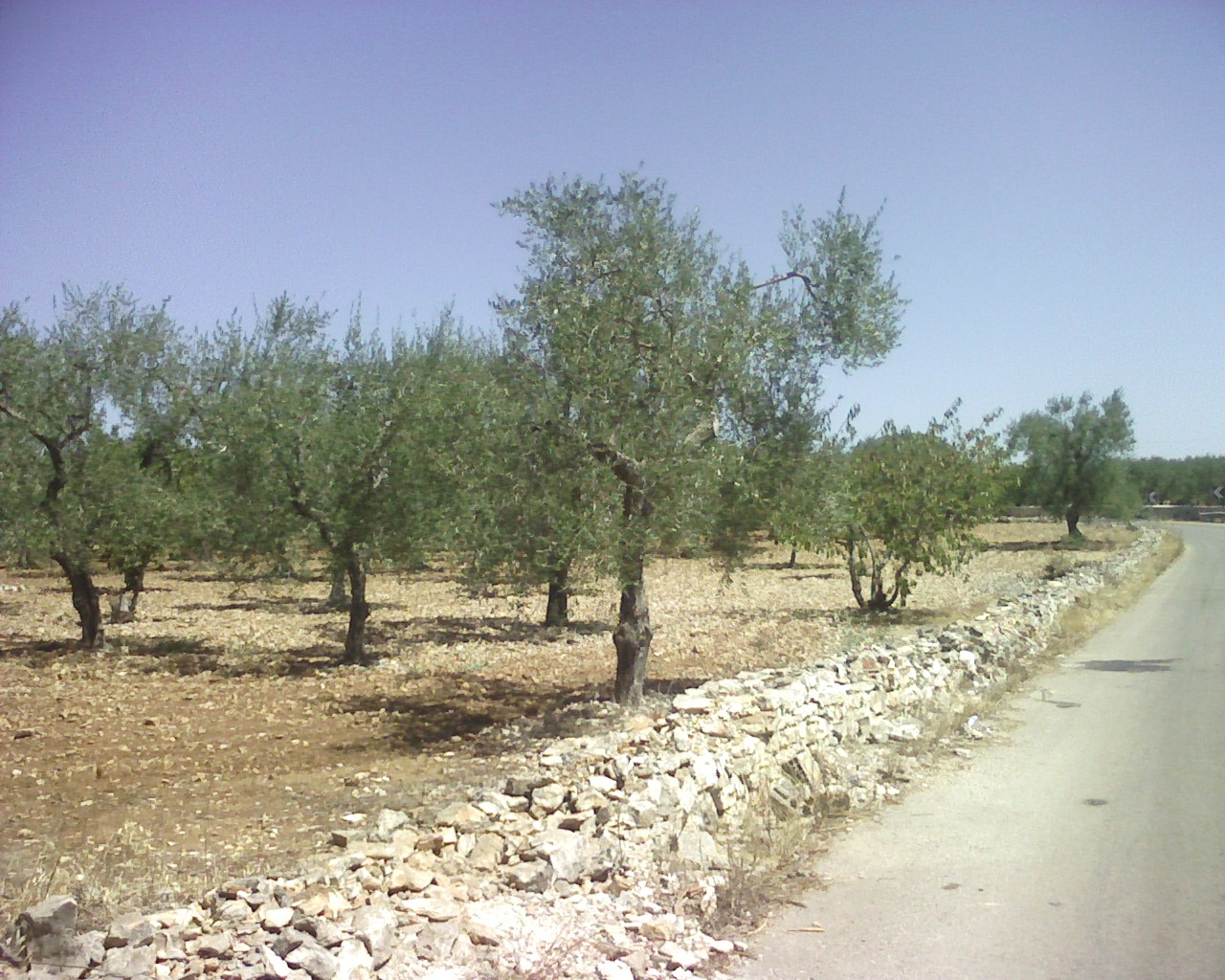 campagna-ulivi - Modugno (bari)-Italy